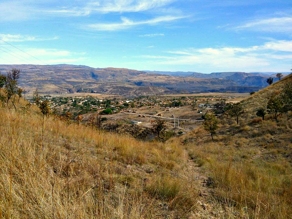 Panorama